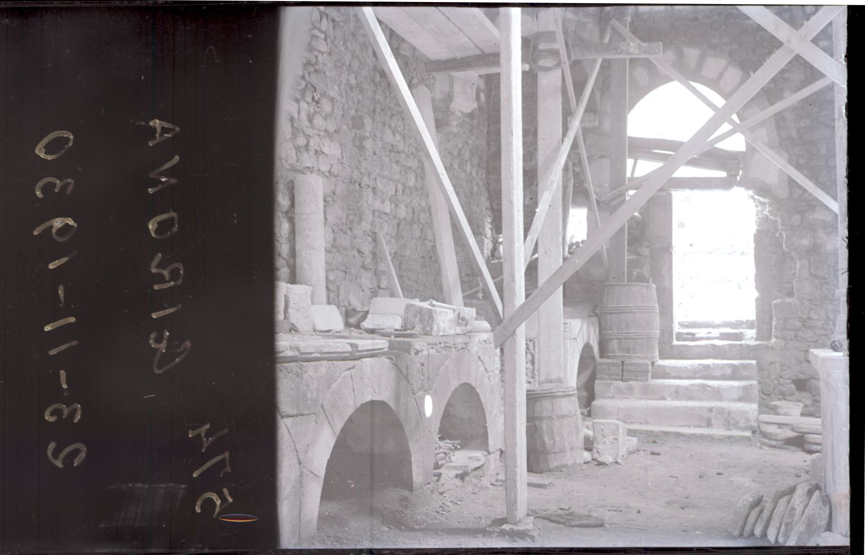 Els Banys Àrabs de Girona durant la reforma feta per l'arquitecte Rafael Masó. Bastida a l'interior de la sala de l'apoditeri durant les obres.